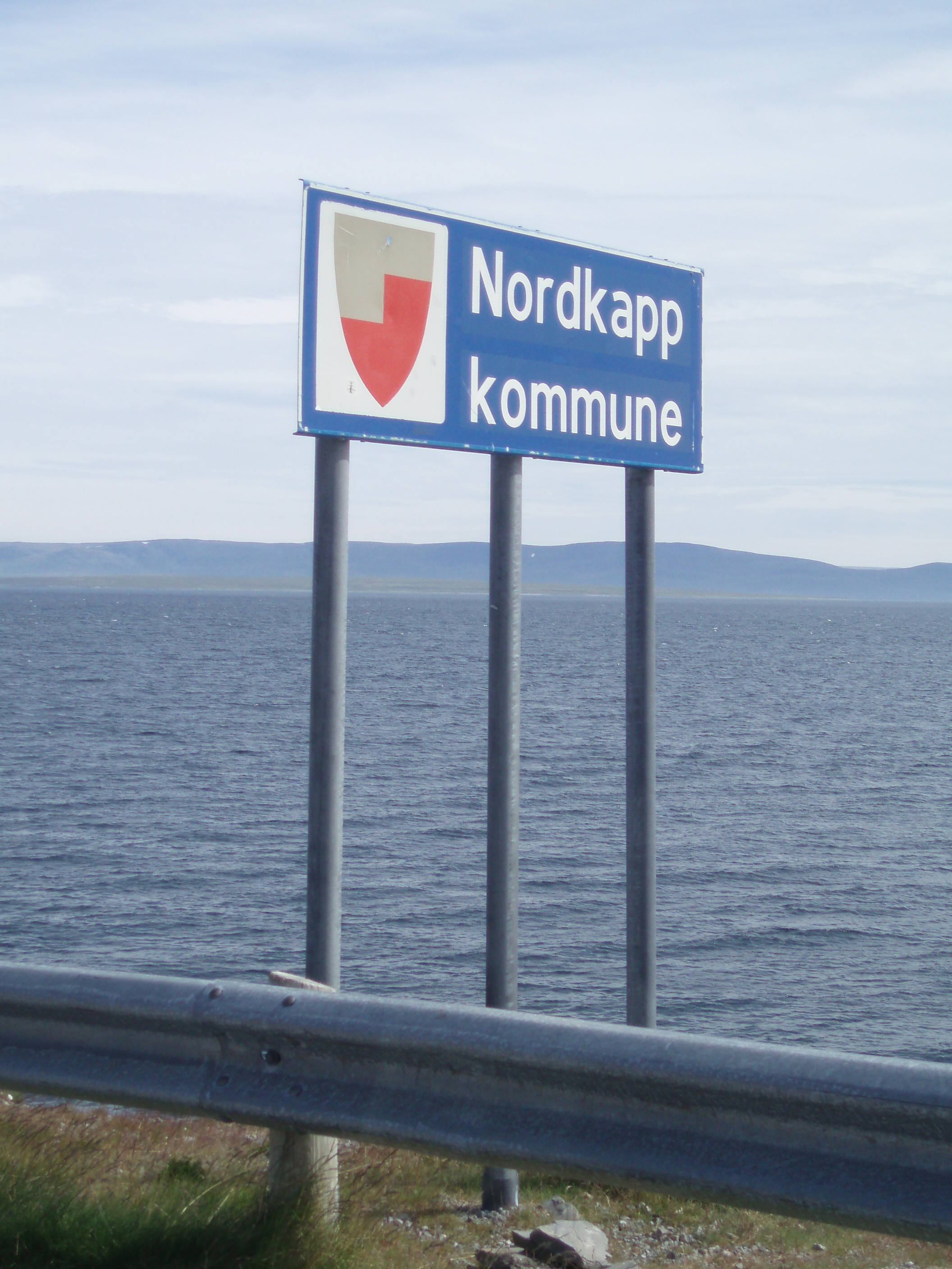 Nordkapp and Porsangerfjorden